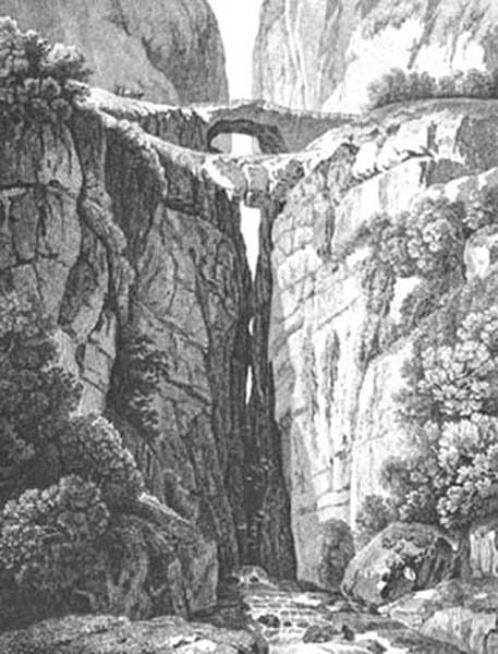 Puente natural sobre el rio Sumapaz en Icononzo, departamento de Tolima , Colombia